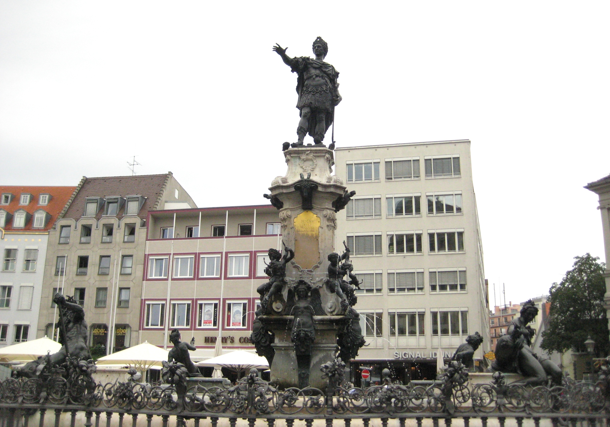 Der Augustusbrunnen auf dem Augsburger Rathausplatz